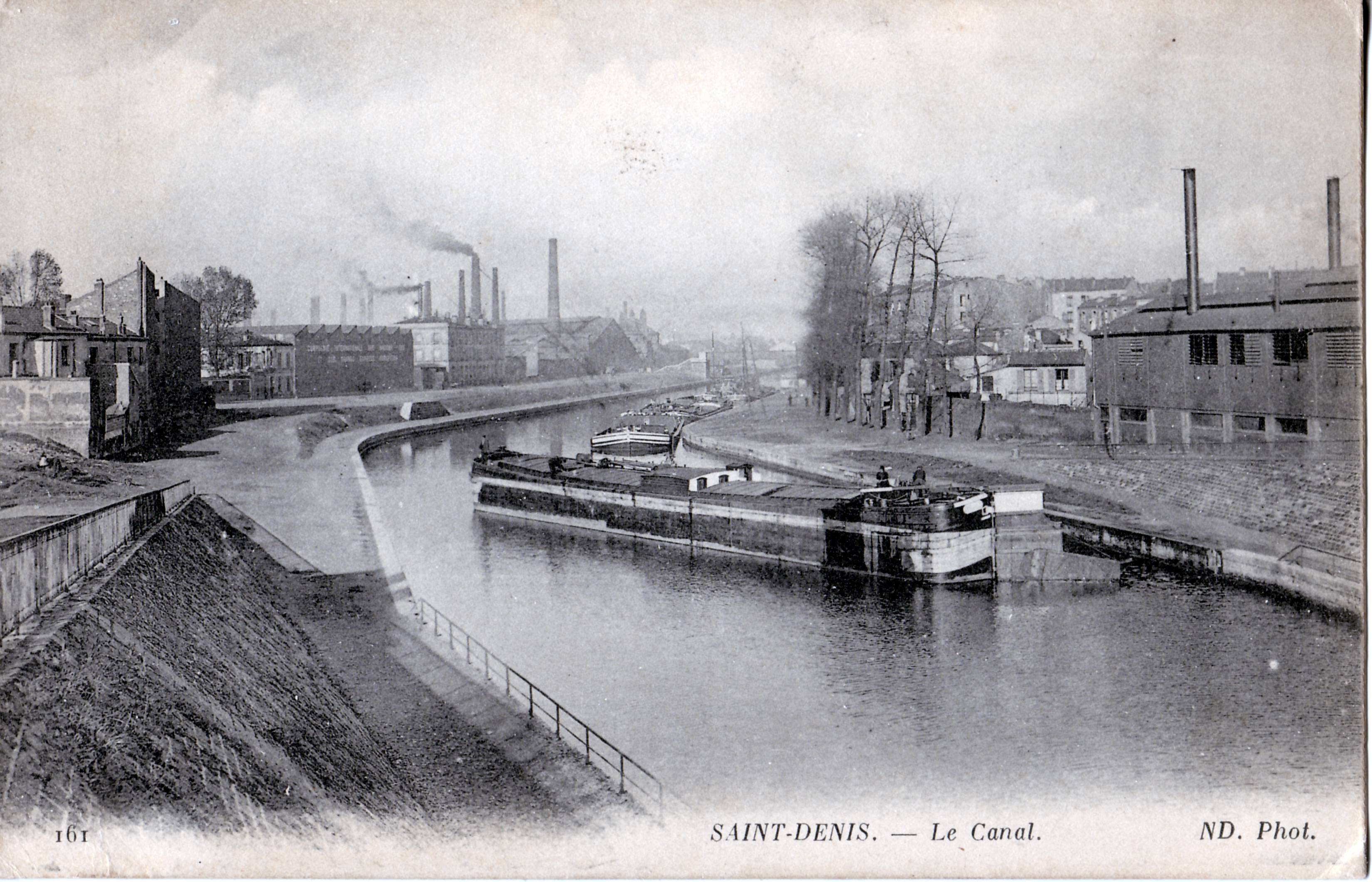 Carte postale ancienne, éditée par ND Phot (N°161) : Le Canal Saint Denis à Saint Denis